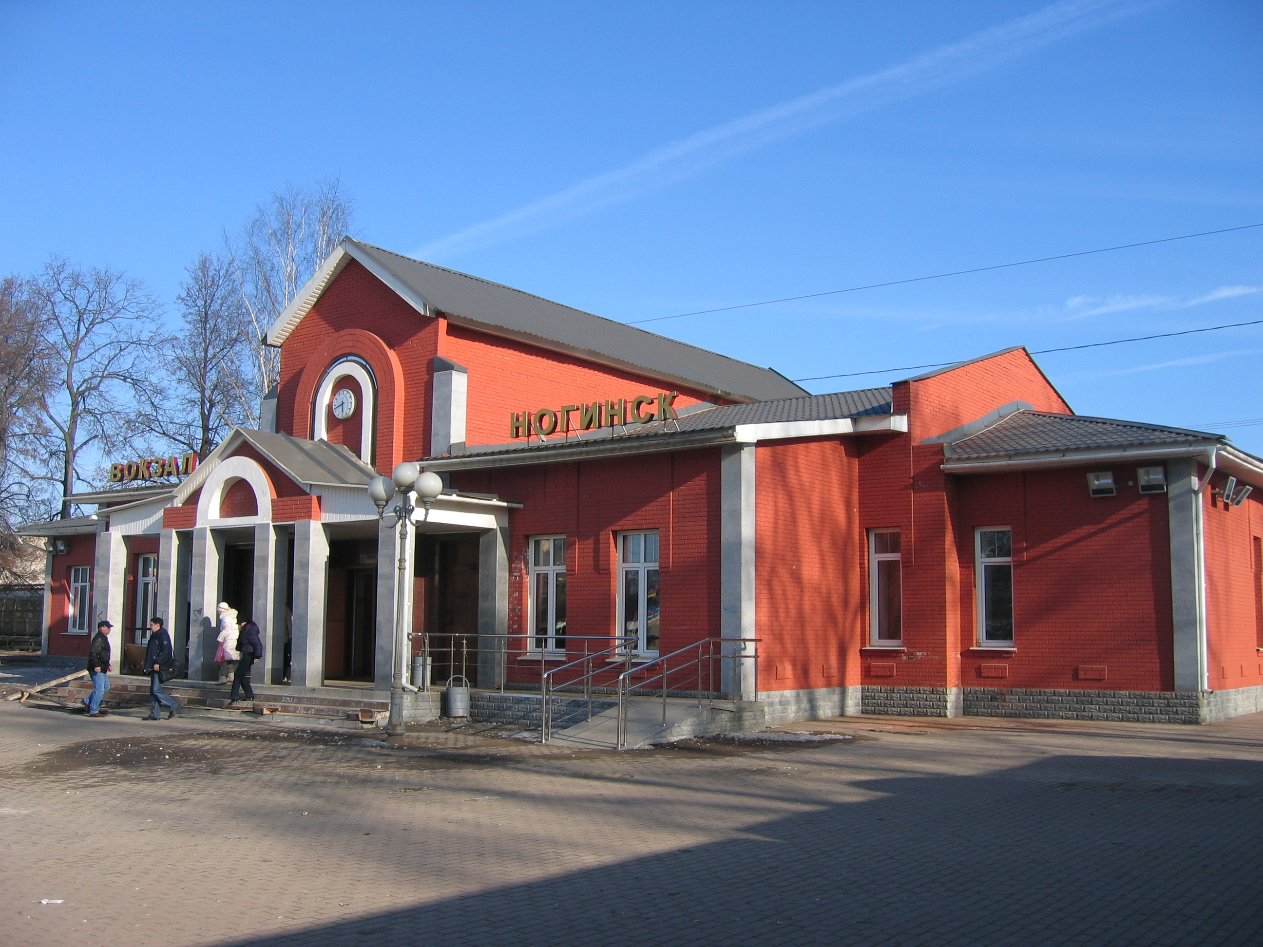 Железнодорожный вокзал в Ногинске